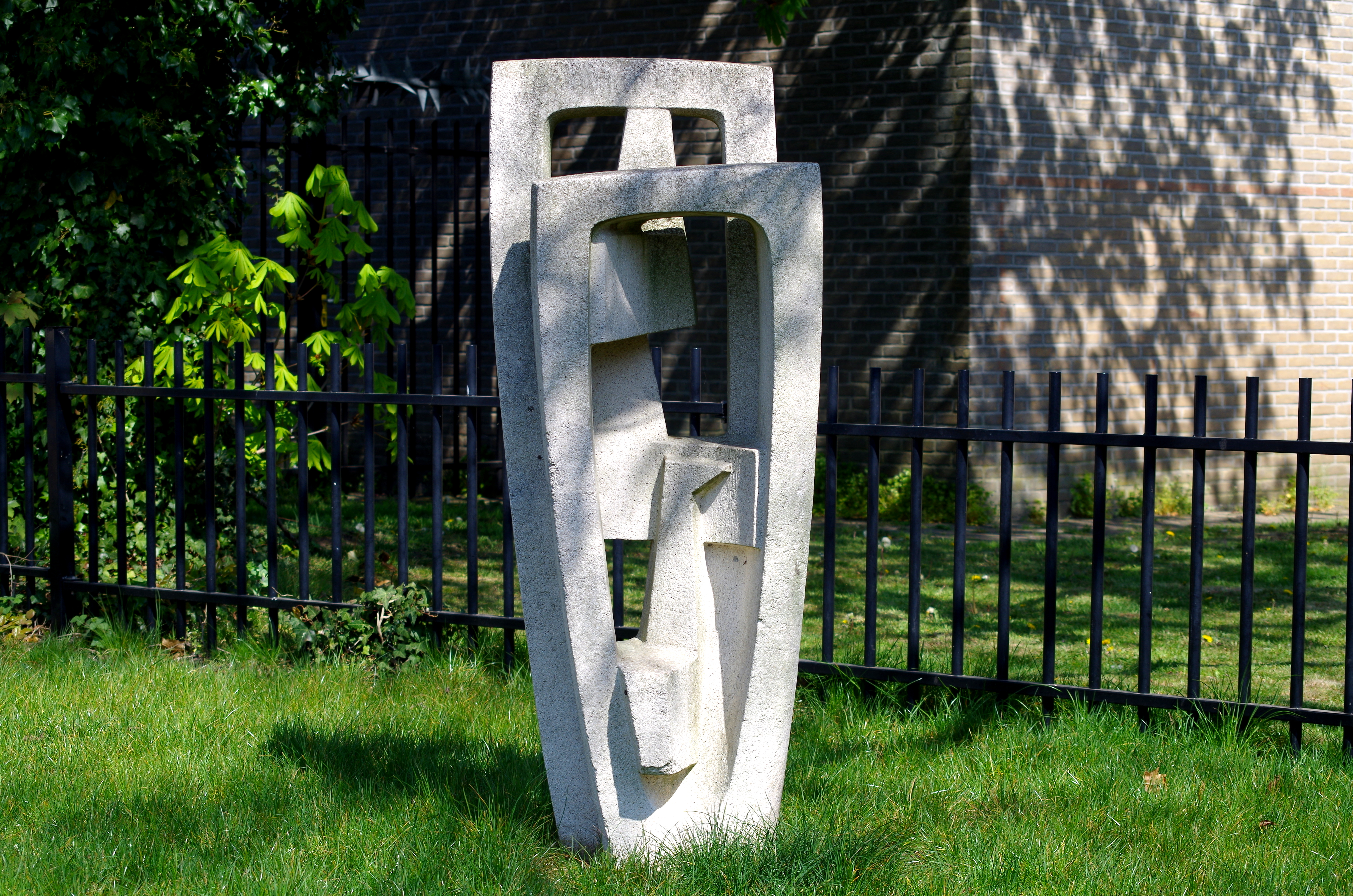 Martin Stolk Zonder Titel